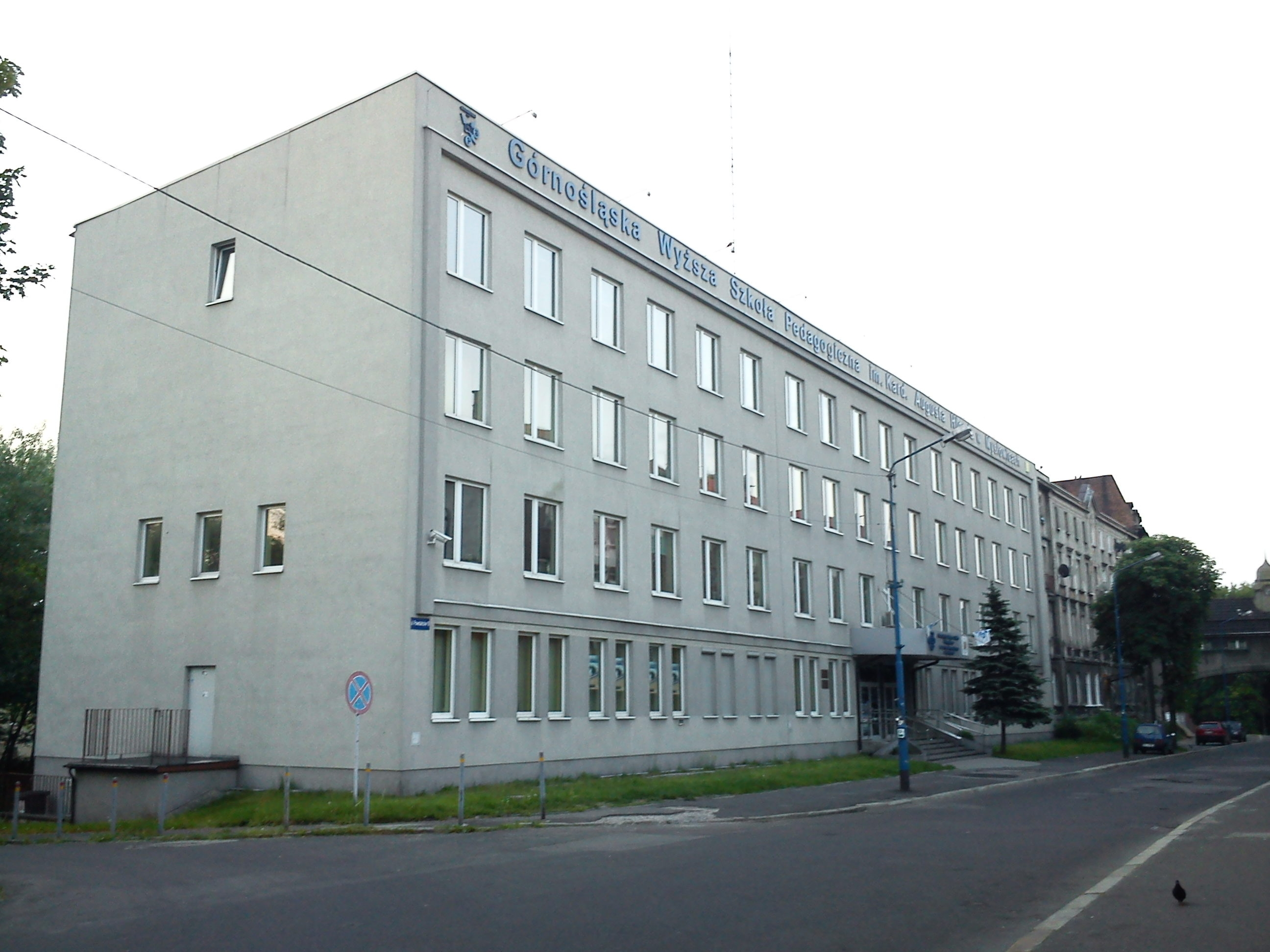 Mysłowice-Górnośląska Wyższa Szkoła Pedagogiczna